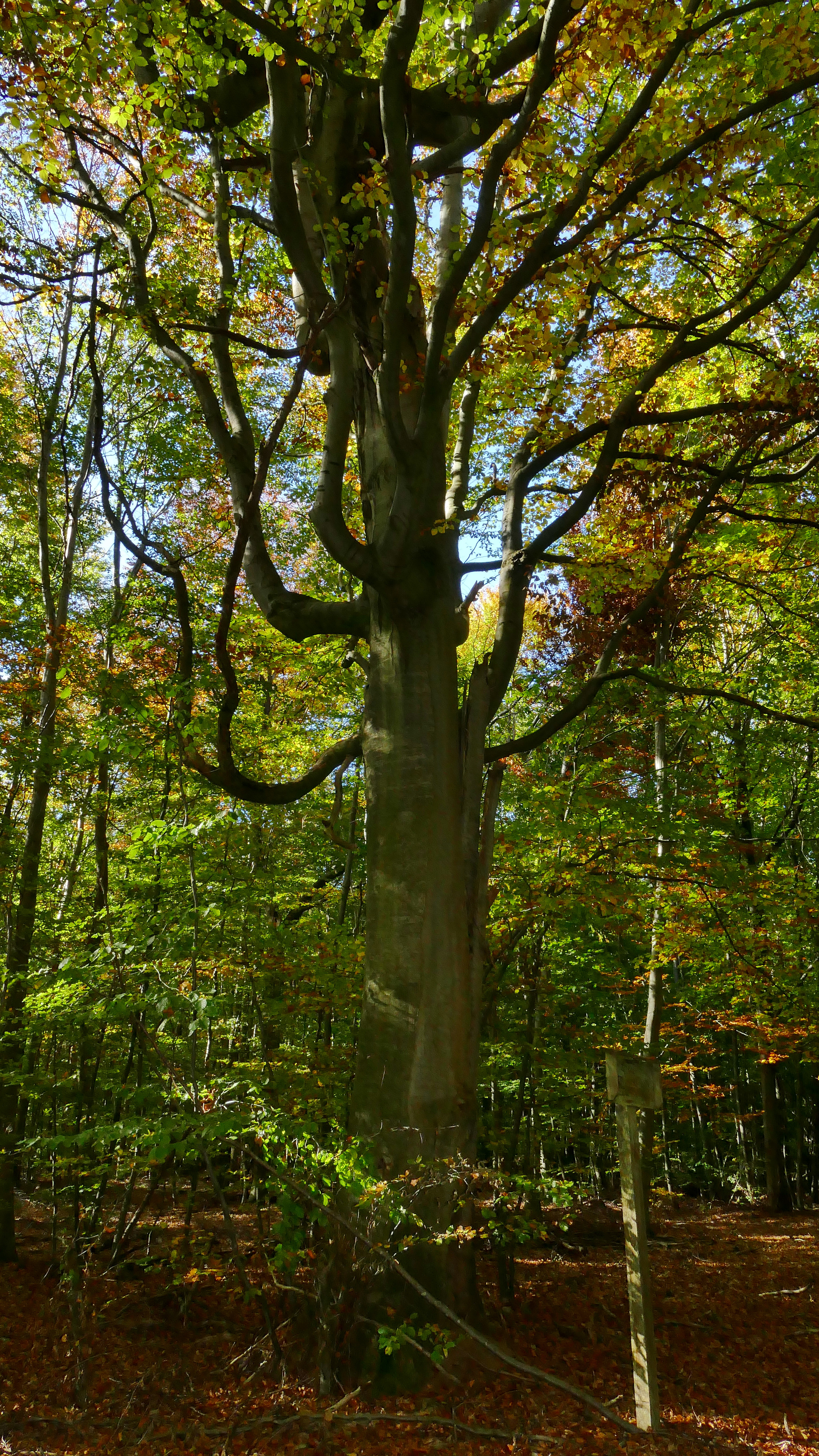 Der Bobenwald bei Ebstorf, in der Nähe von Uelzen, ist ein alter, meist naturnaher Buchenwald, der seit 2007 als FFH-Gebiet und seit dem 1. August 2018 als Naturschutzgebiet geschützt wird.